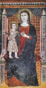 Effigie della Regina Apuliae